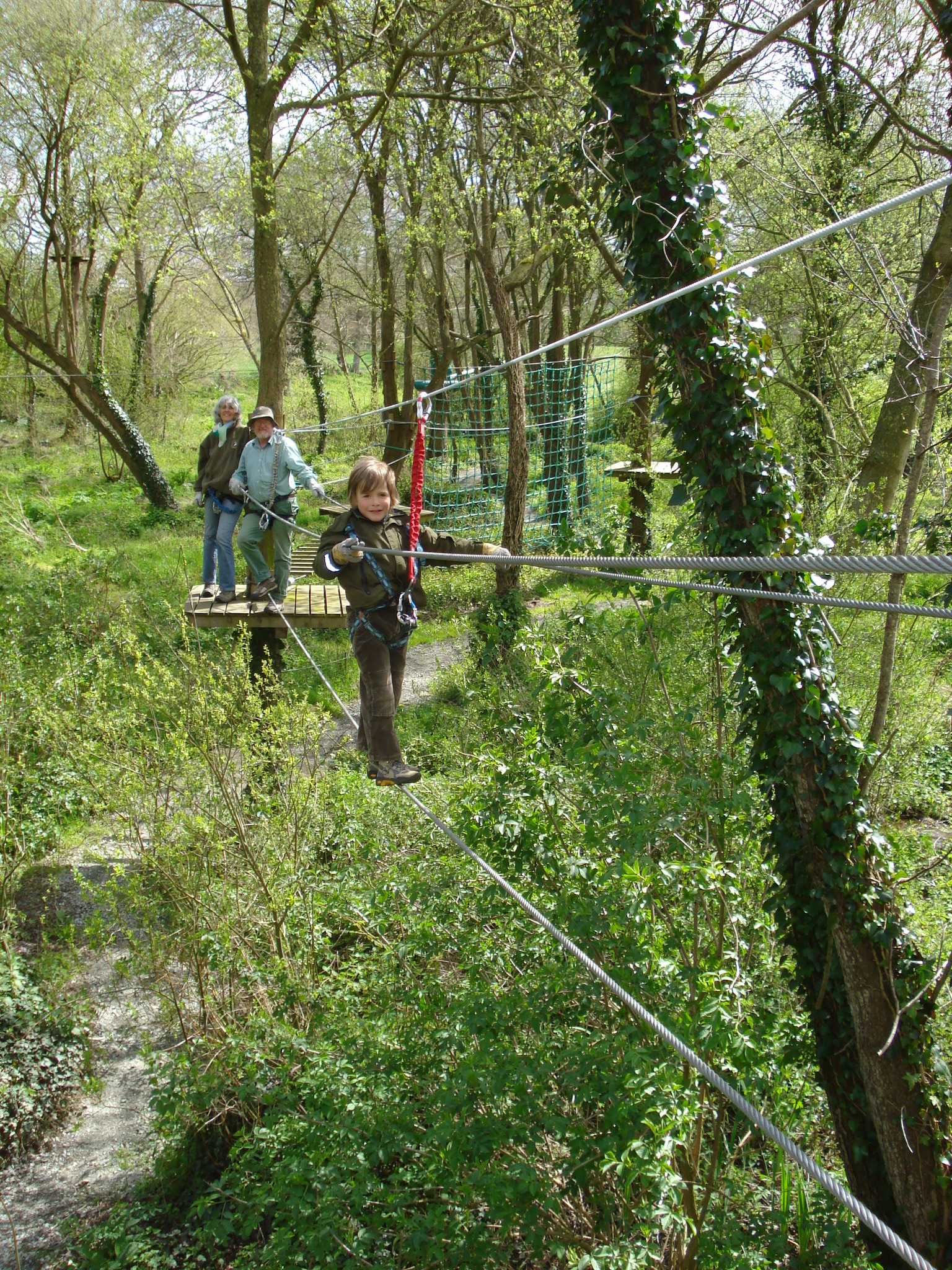 Arbaraventurejo en Morieu, Bretonio, Francio